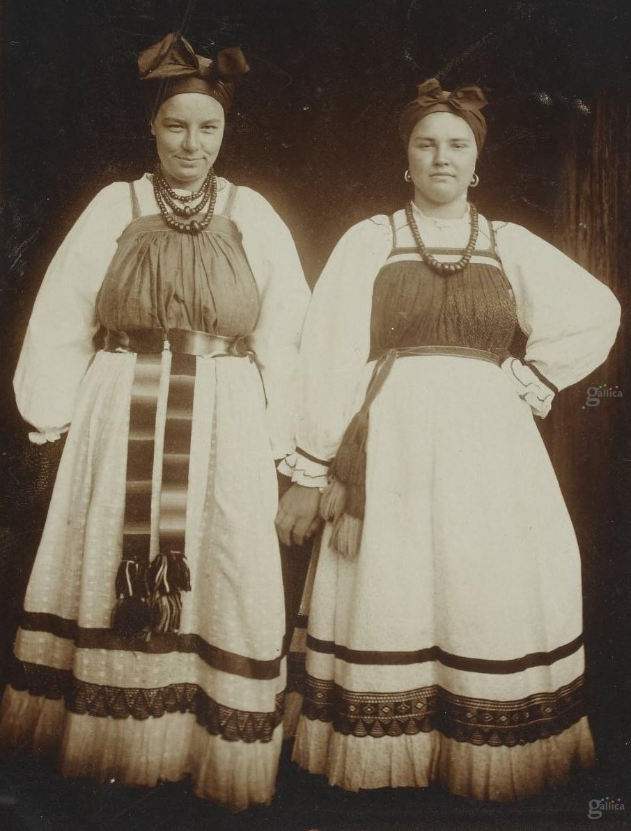 "Путешествие на Север". Фотоальбом Н.А. Шабунина. 1906 г.